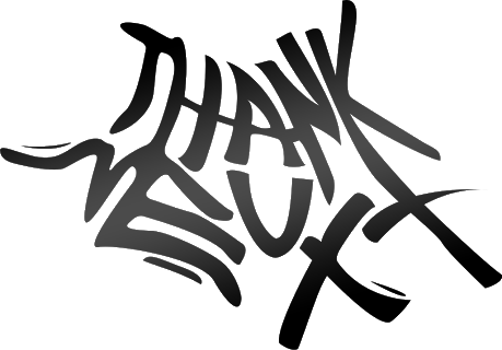 Logo del álbum Thank U, Next de Ariana Grande